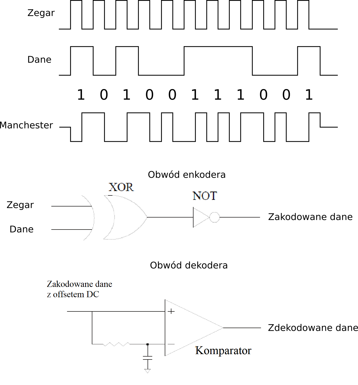 Arinc